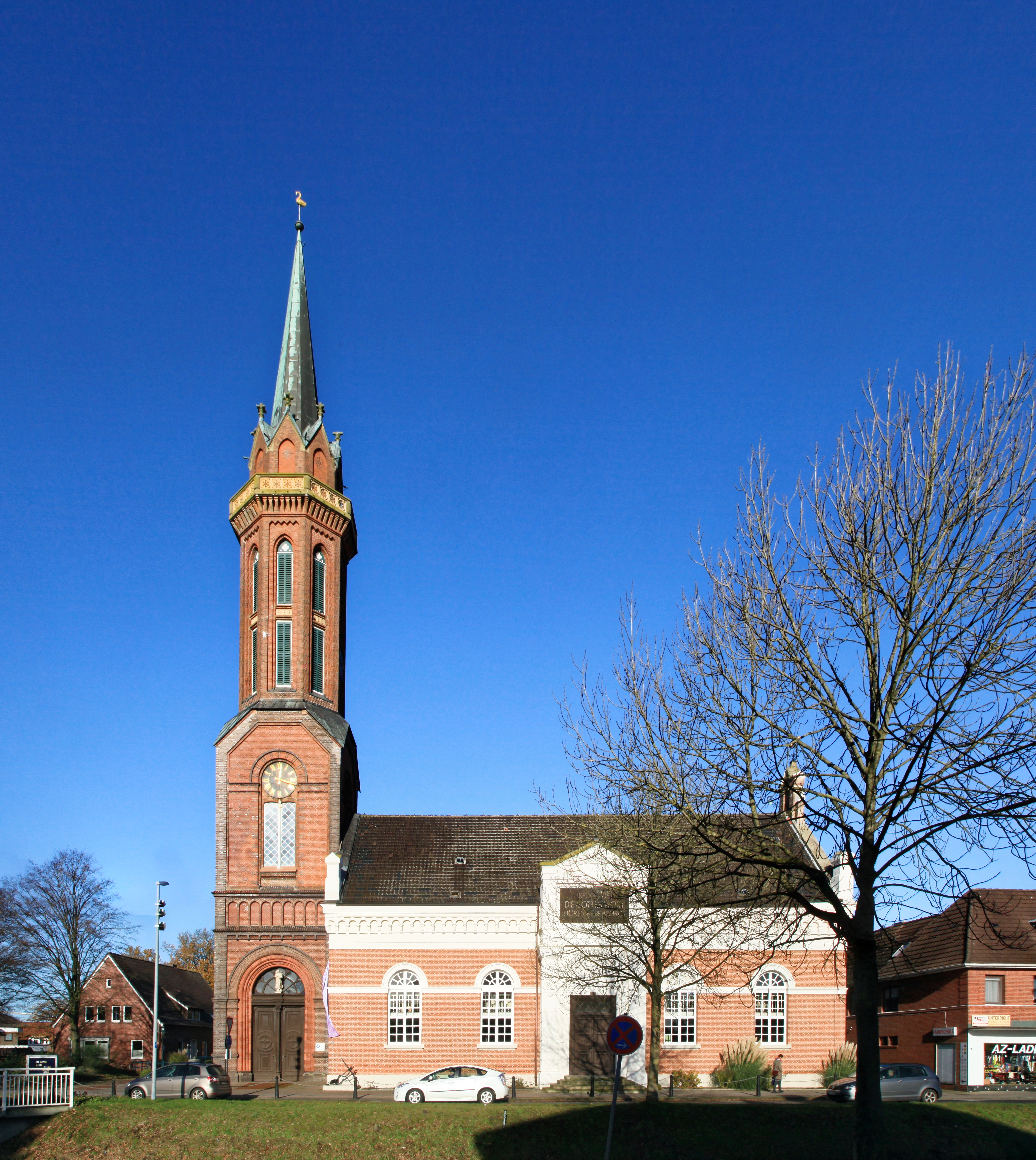 Hoffnungskirche am Untenende in Rhauderfehn